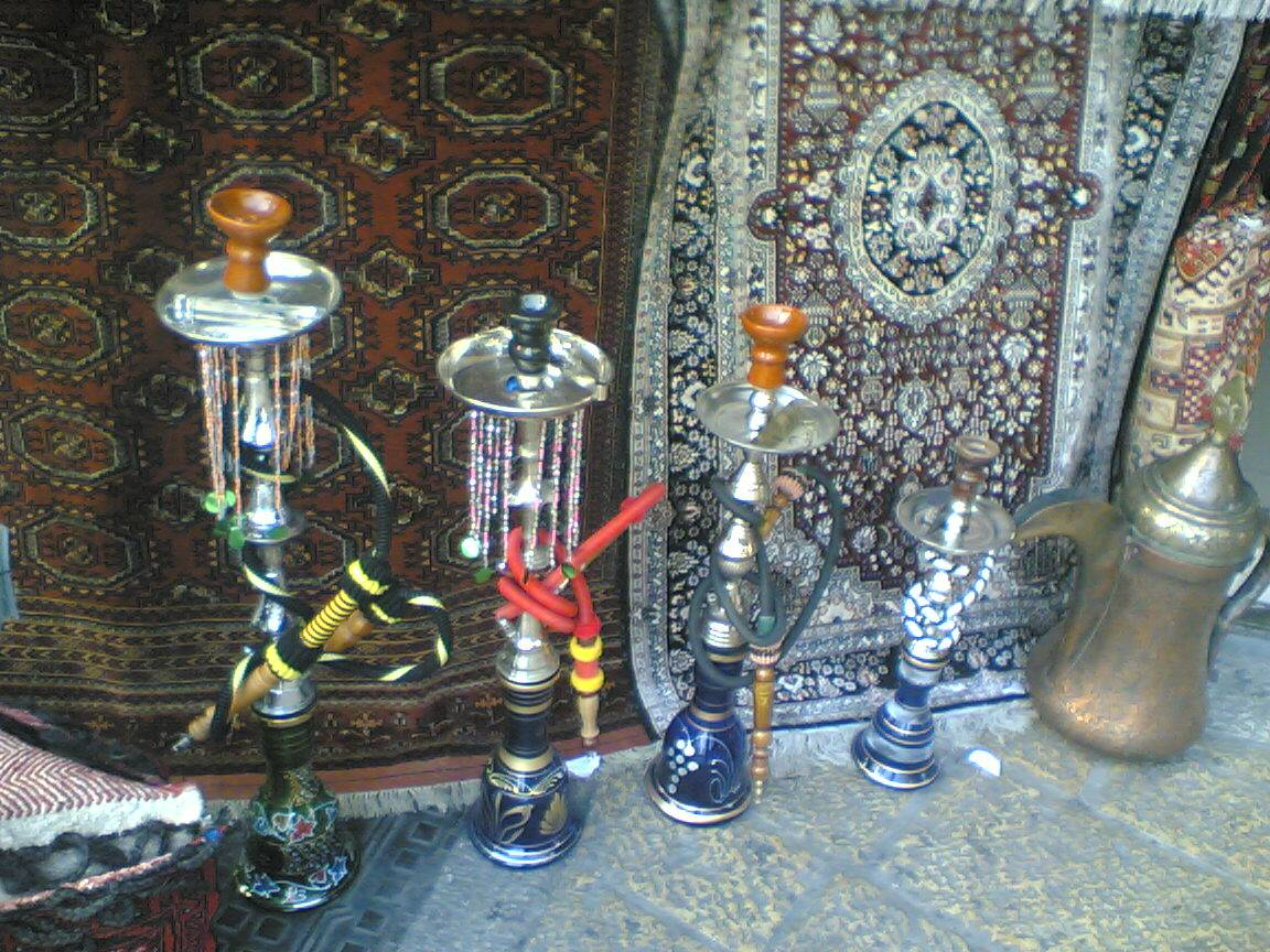 Hookas for sale in Jerusalem: Hookas for sale in Jerusalem at the bazaar.